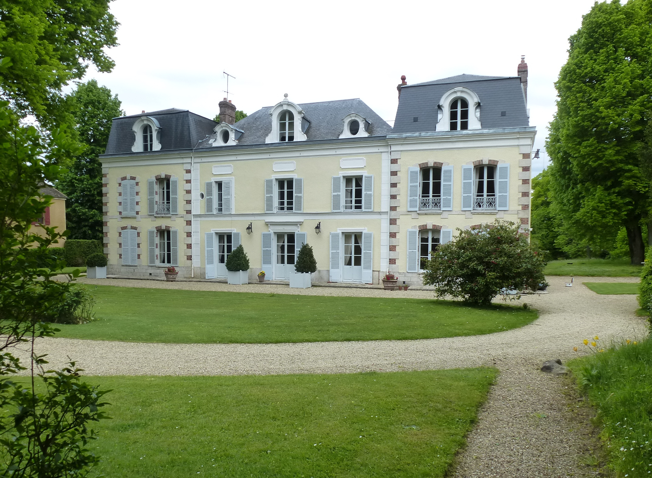 Château de Darvault (Seine-et-Marne, Île-de-France, France).